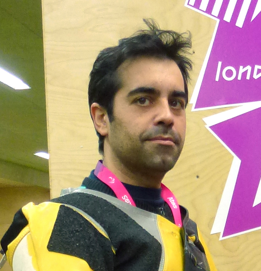 Juan Saavedra